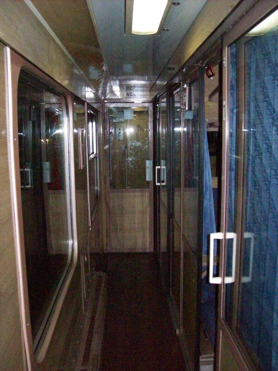 TLK wagon II klasy.